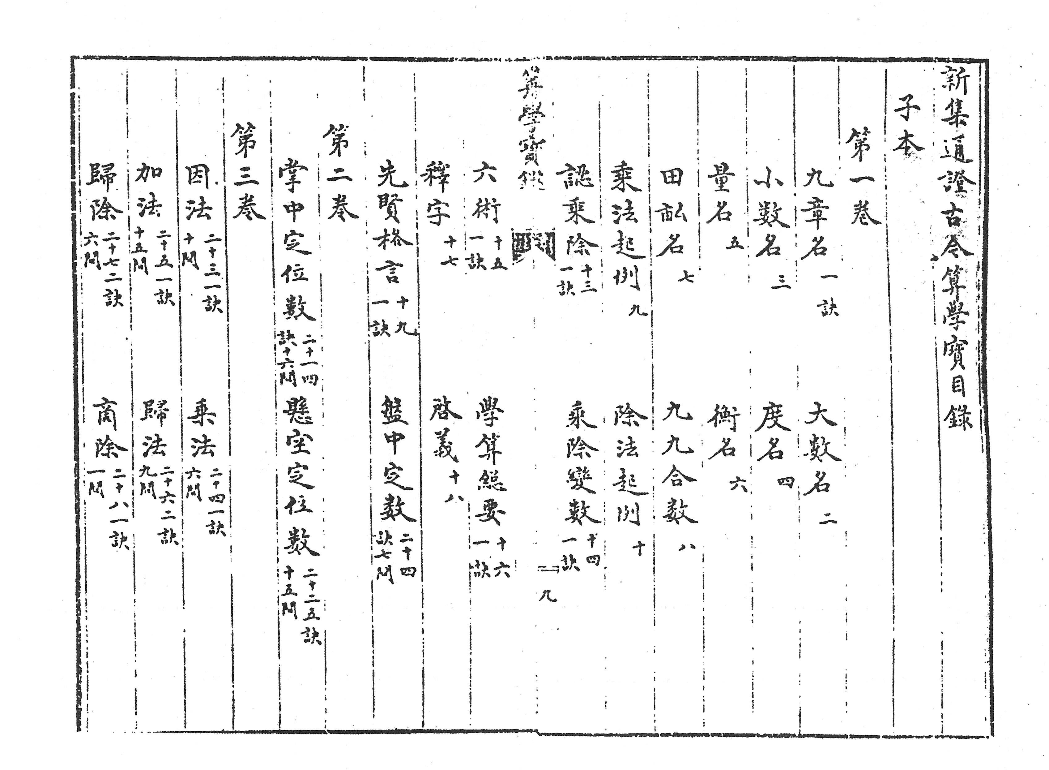 王文素 算学宝鉴目录